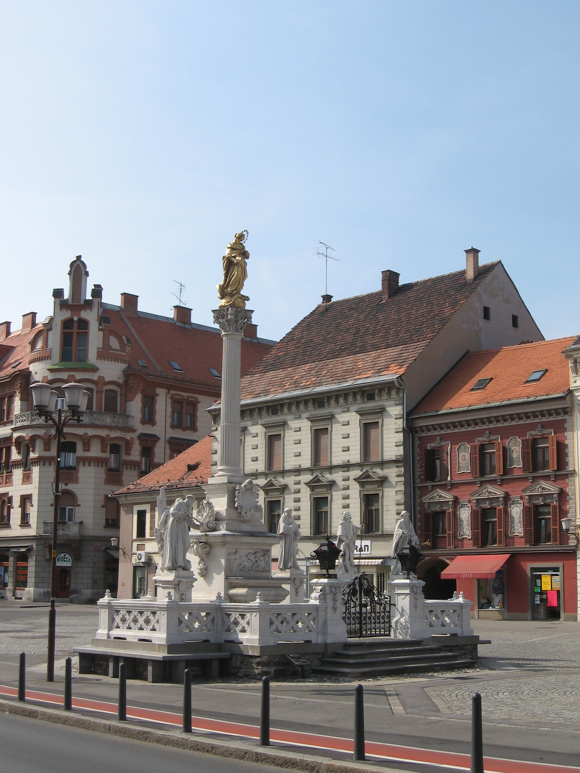 Kužno znamenje, Maribor